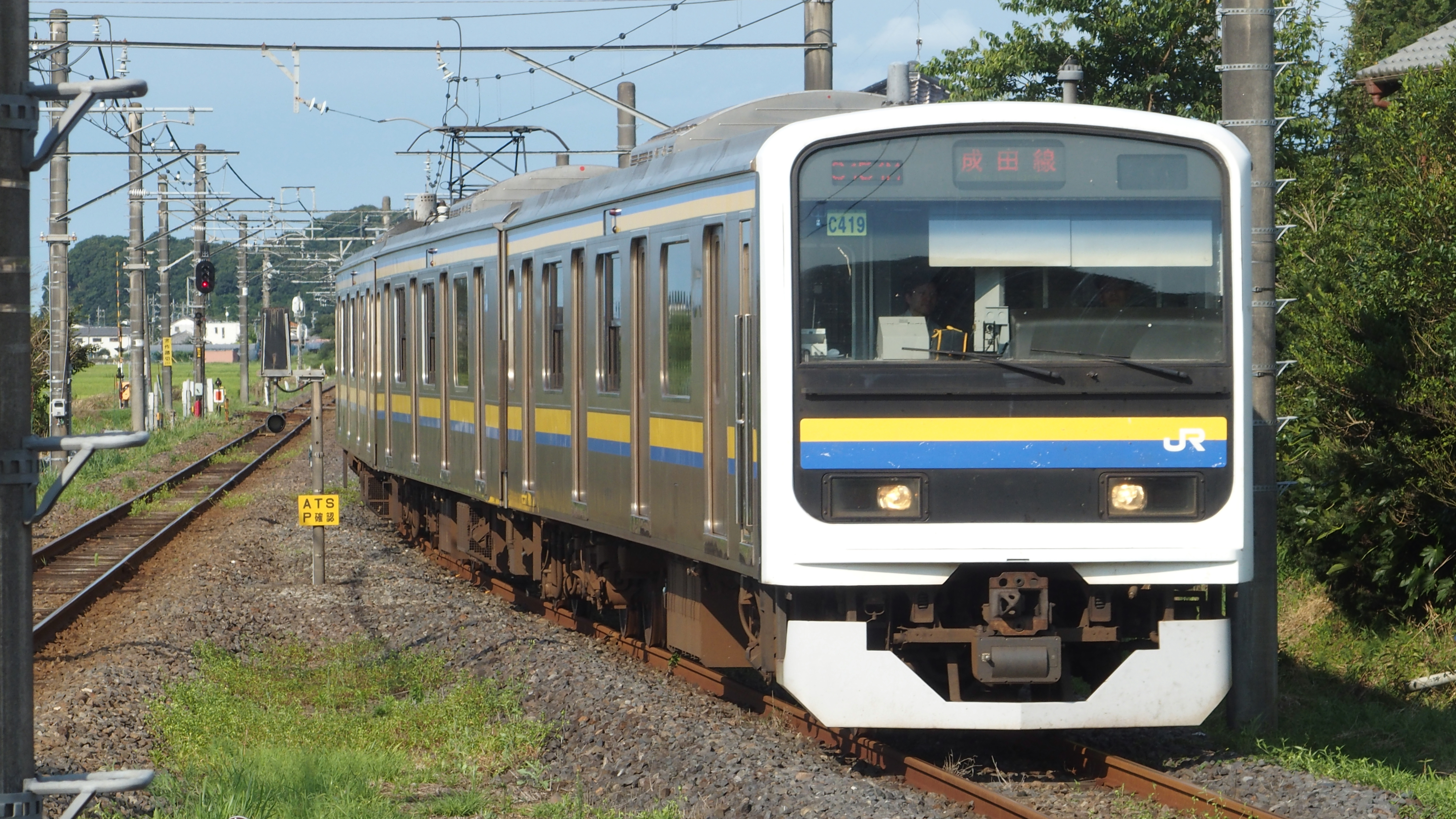 大戸駅に到着する209系